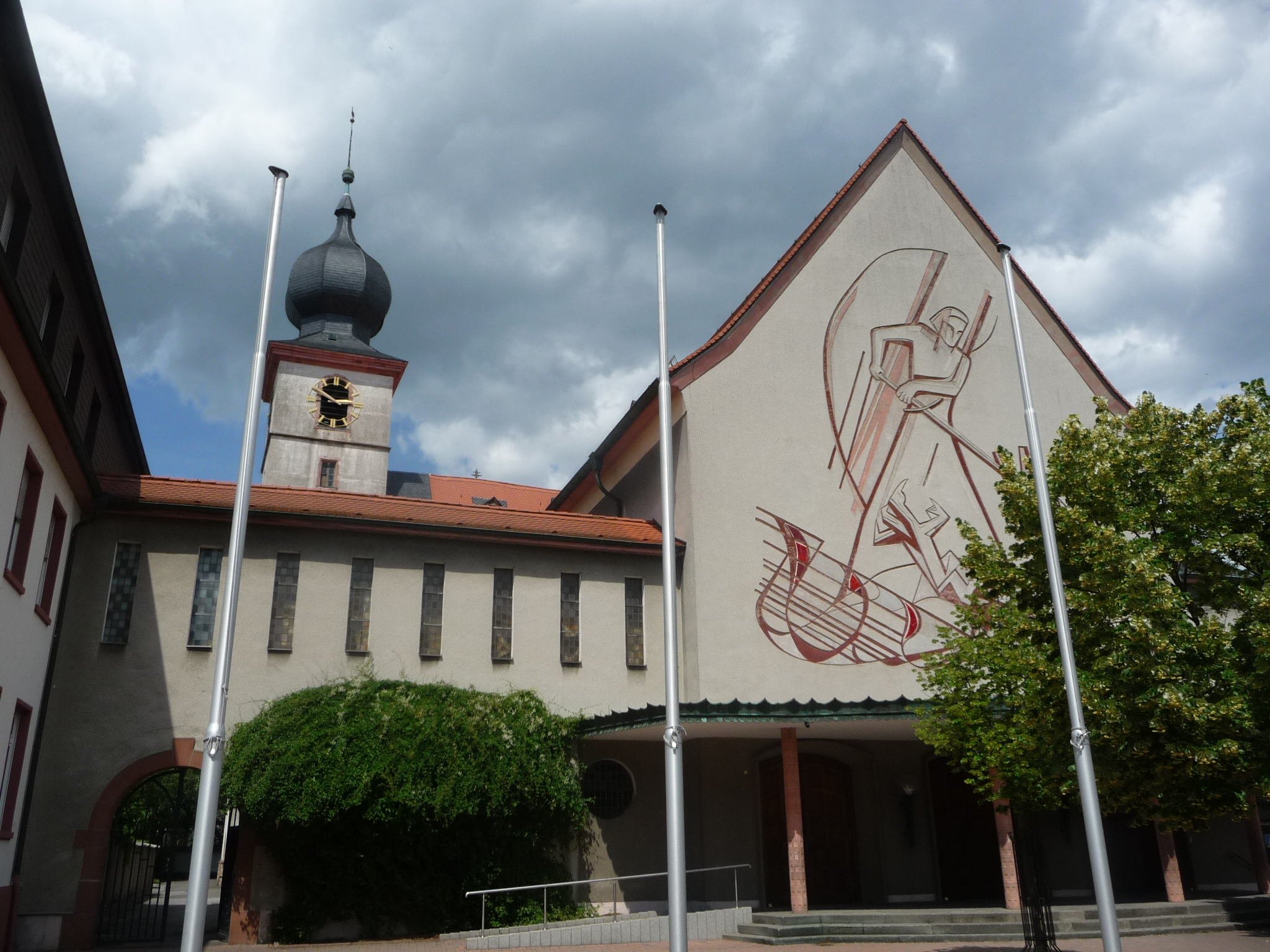 Kirche St. Michael. Bürstadt ist eine Stadt im Süden von Hessen im Kreis Bergstraße.